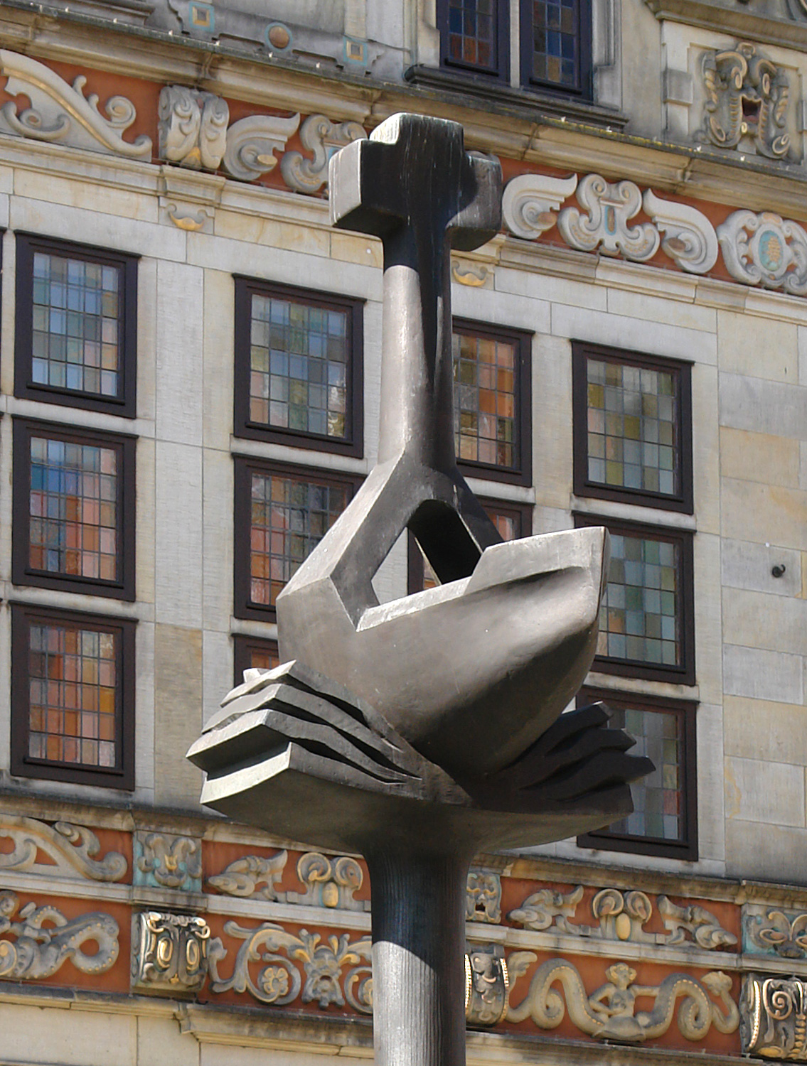 Ansgar-Säule am Ansgarikirchhof in Bremen. Errichtet: 1965. Material: Bronze. Entwurf und Ausführung: Kurt-Wolf von Borries k: kunst im öffentlichen raum bremen